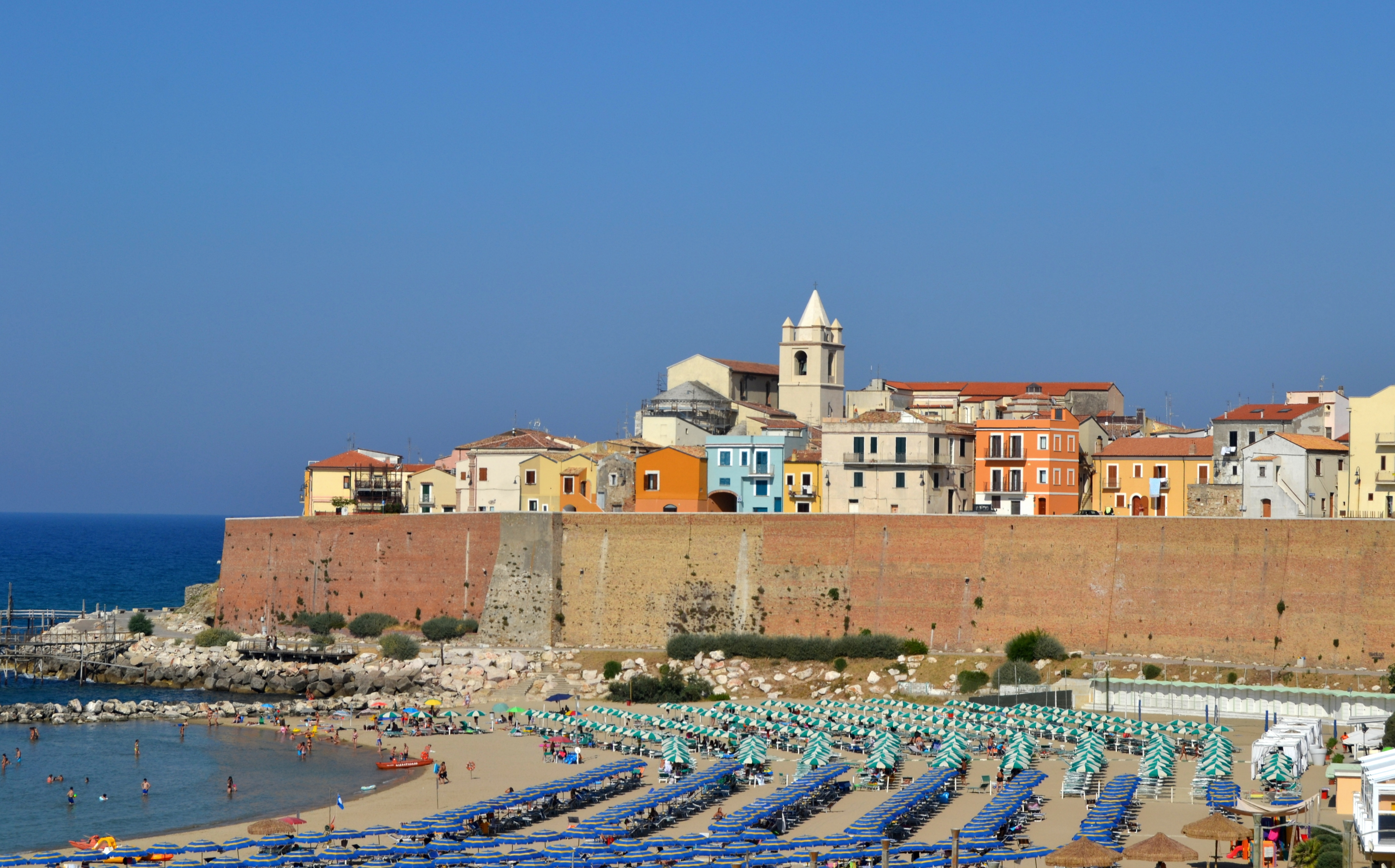 veduta del centro di Termoli